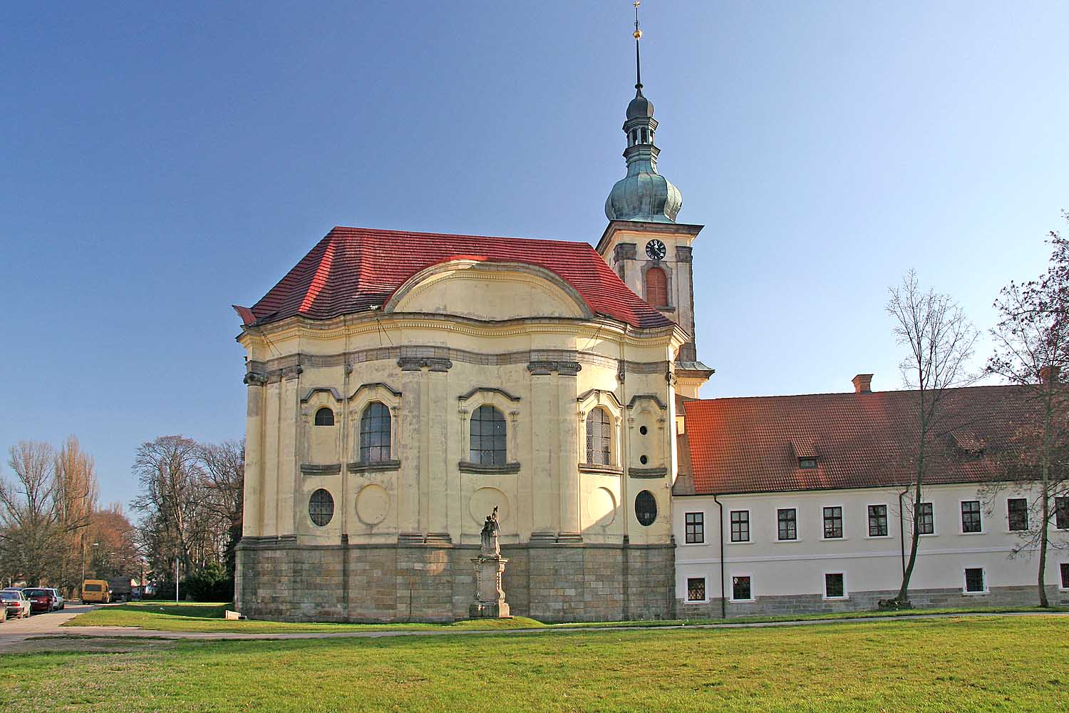 Zámecká kaple Zjevení Páně ve Smiřicích, district Hradec Králové